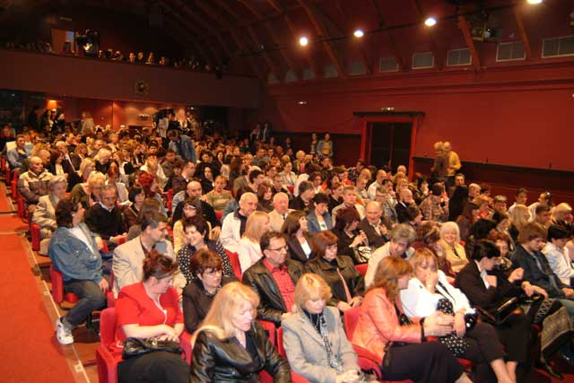 Moja fotografija.